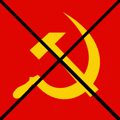 Anti-communism icon